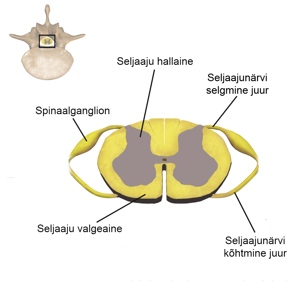 Spinaalganglion ja seljaaju